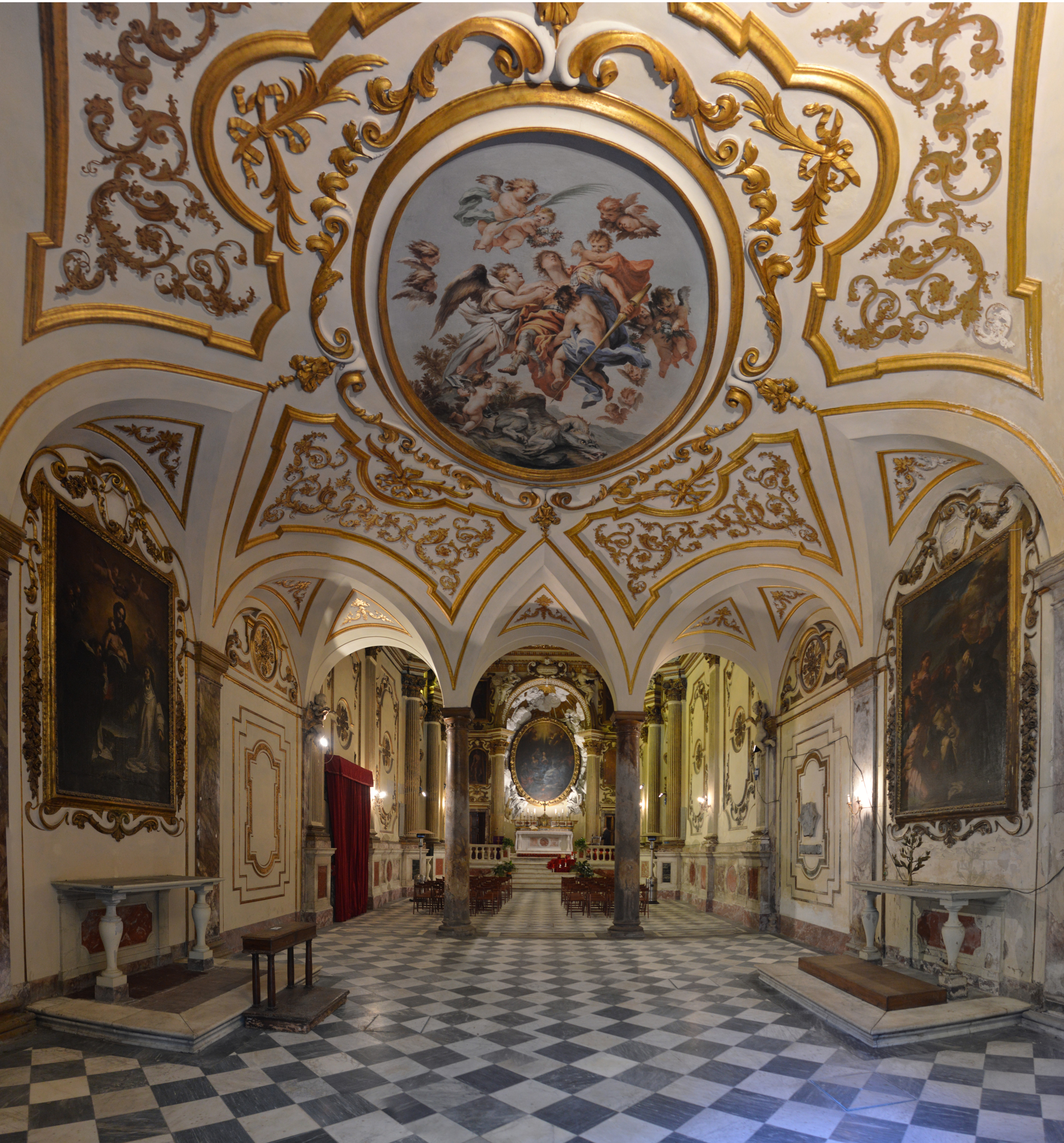 Interno dal portale d'ingresso. Sulla volta dell'endonartece, San Giorgio in gloria di Alessandro Gherardini (1705).